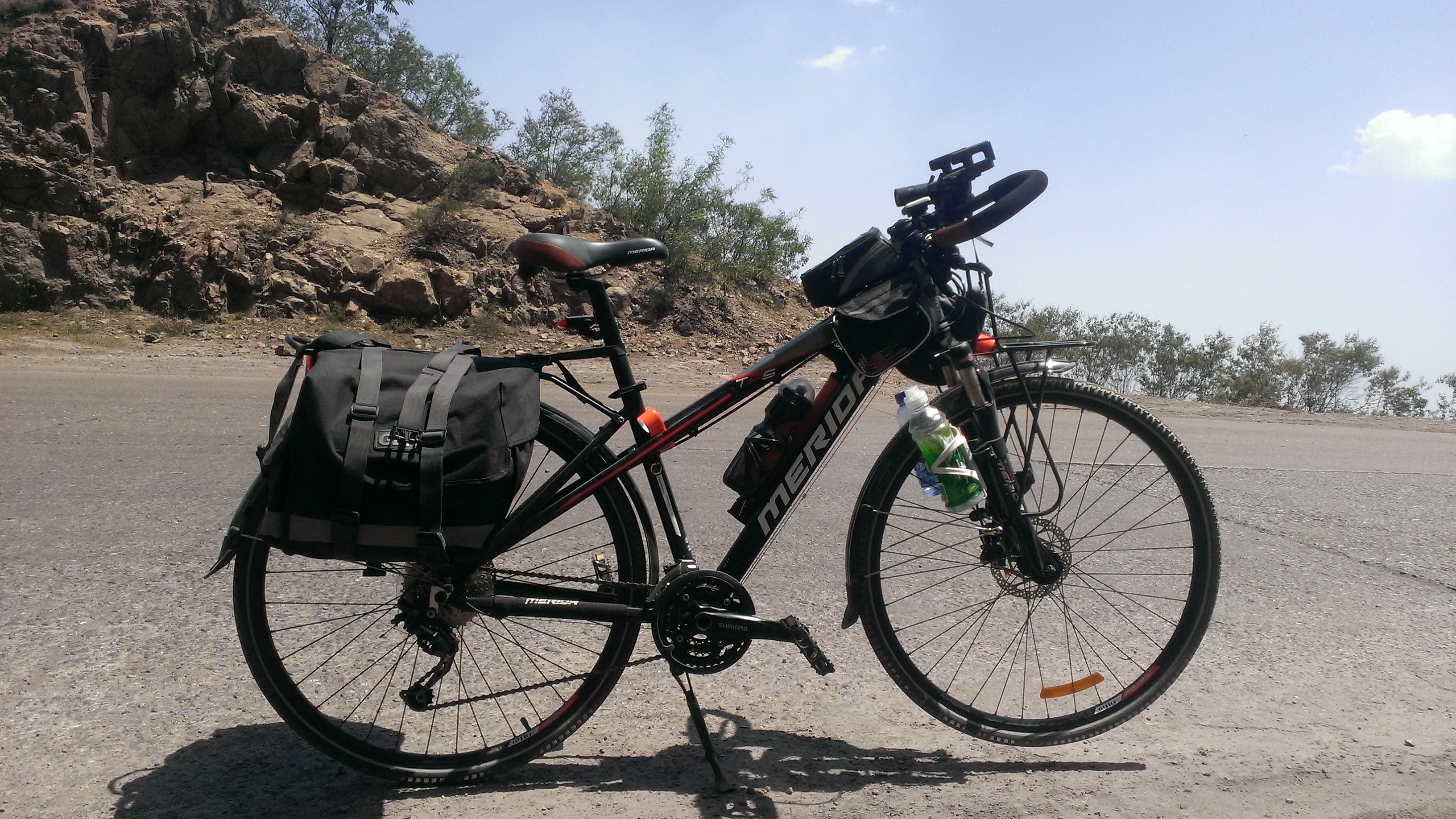 中文（中国大陆）: 在中国大陆广泛使用的美利达野狼三号